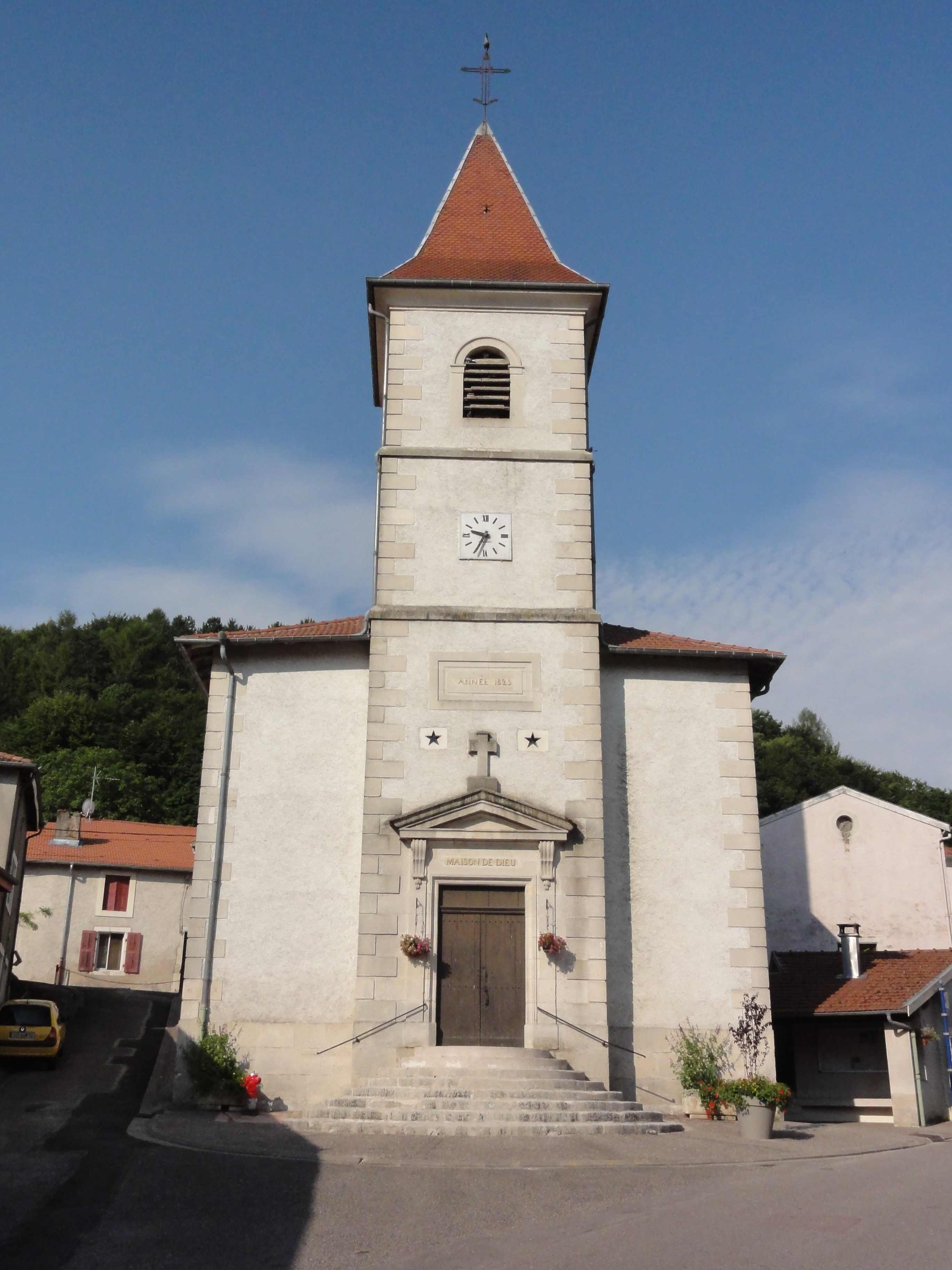 Laneuveville-derrière-Foug (Meurthe-et-M.) église